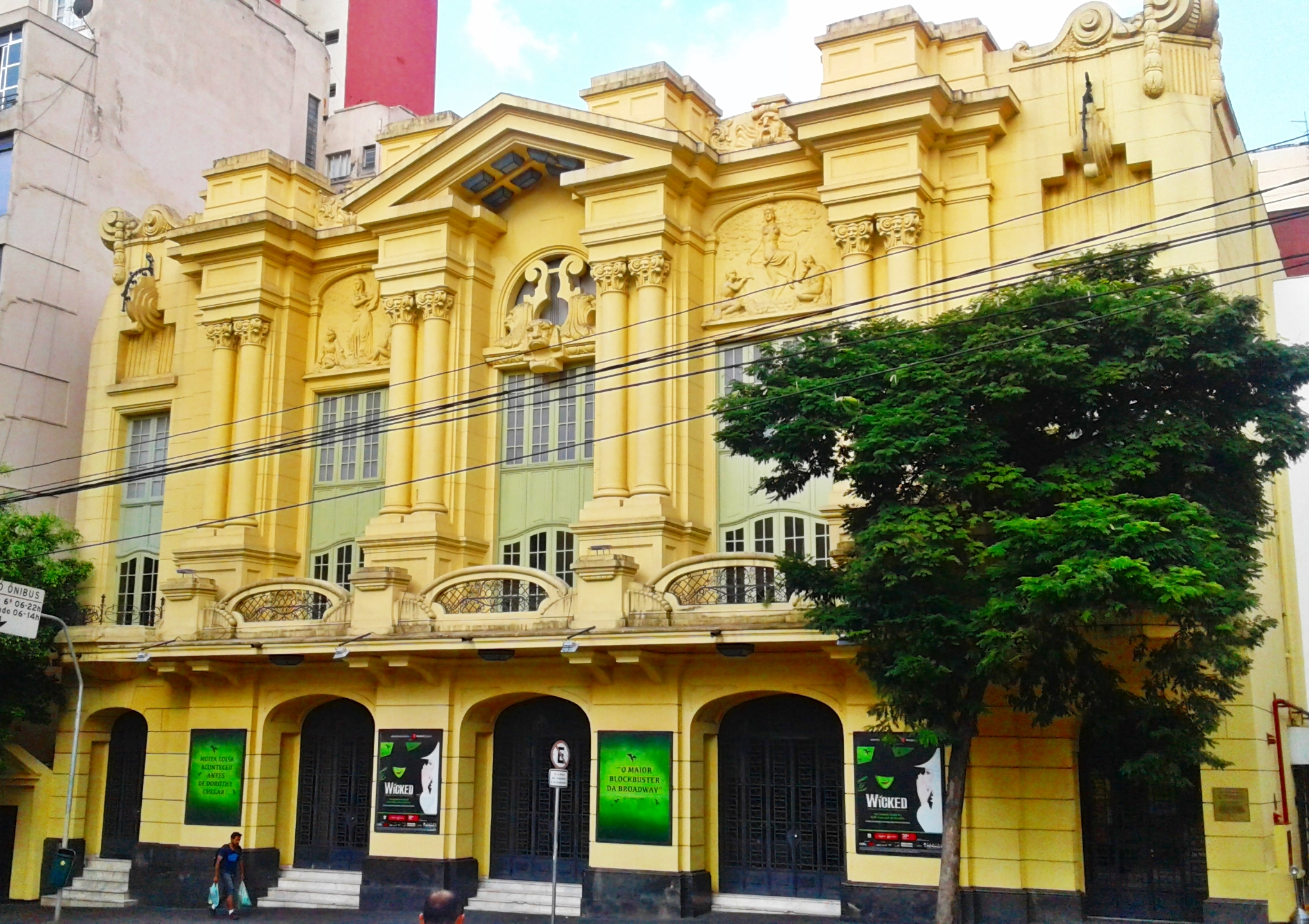 Teatro Renault durante a temporada de "Wicked" em São Paulo